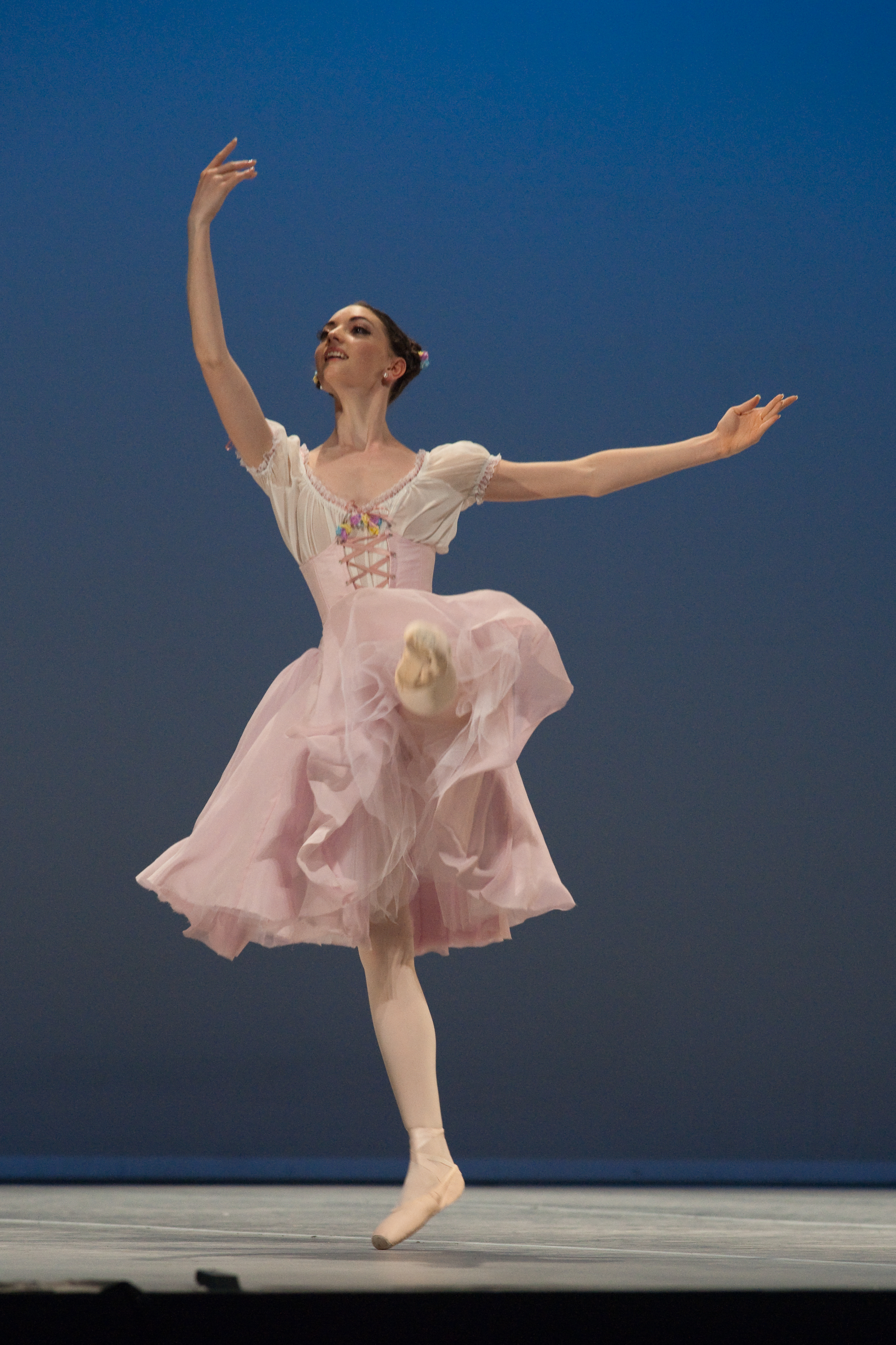 Variation extraite de Coppélia au Prix de Lausanne 2010.